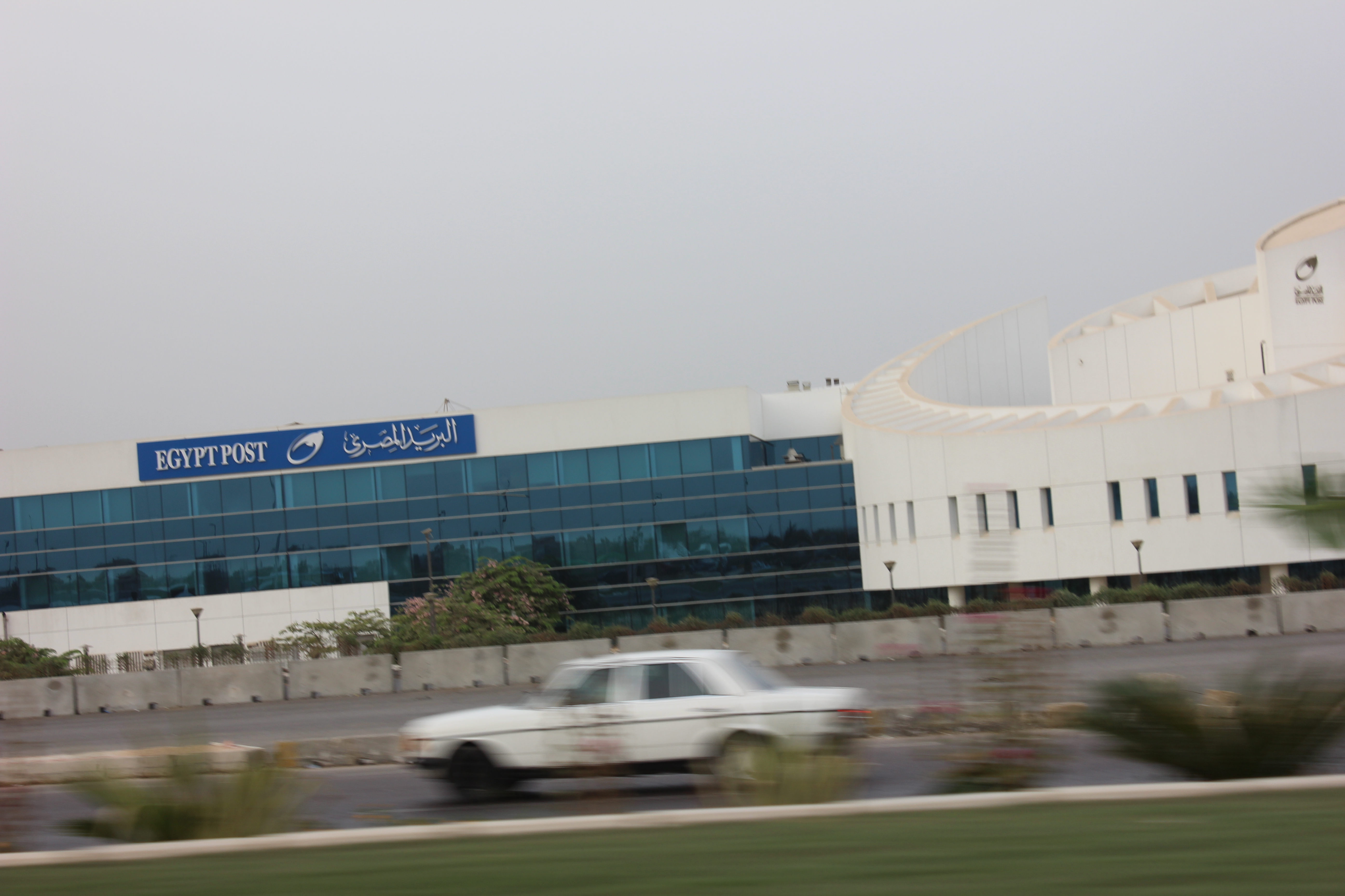 مبانٍ القرية الذكية في الكيلو 29 مصر.